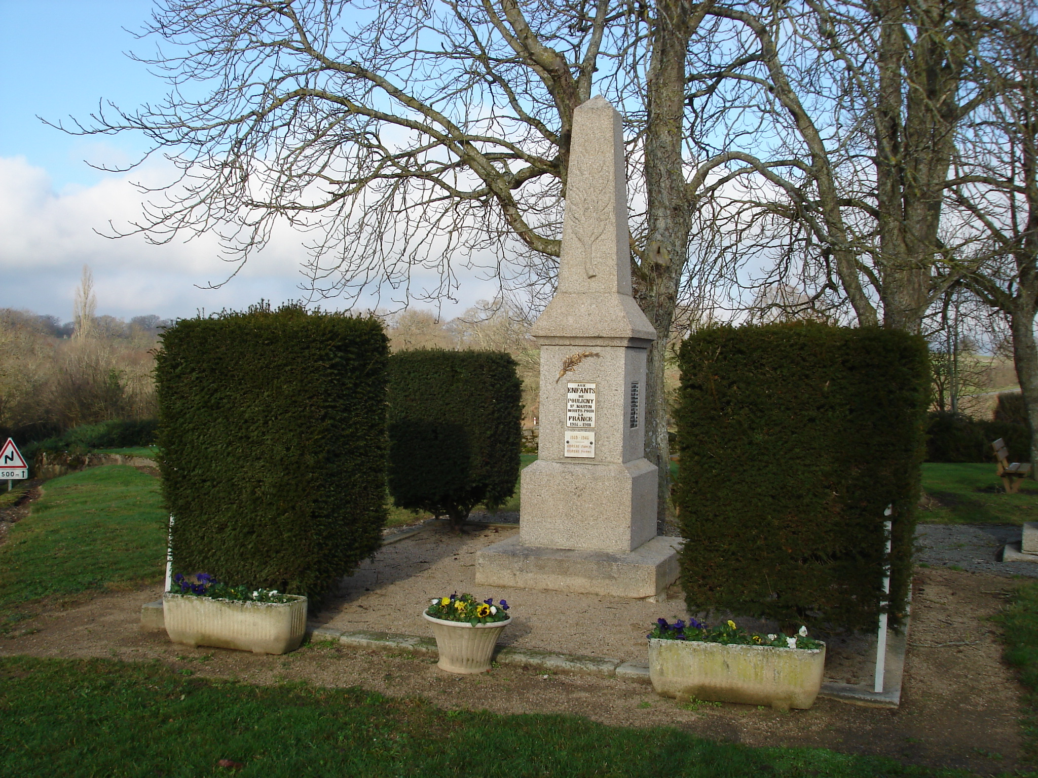 Pouligny-Saint-Martin (36) : Le monument aux morts.